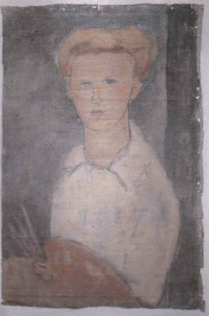 Porträt von Heinz Witte-Lenoir 1907 in Paristitle QS:P1476,de:"Porträt von Heinz Witte-Lenoir 1907 in Paris" label QS:Lde,"Porträt von Heinz Witte-Lenoir 1907 in Paris"